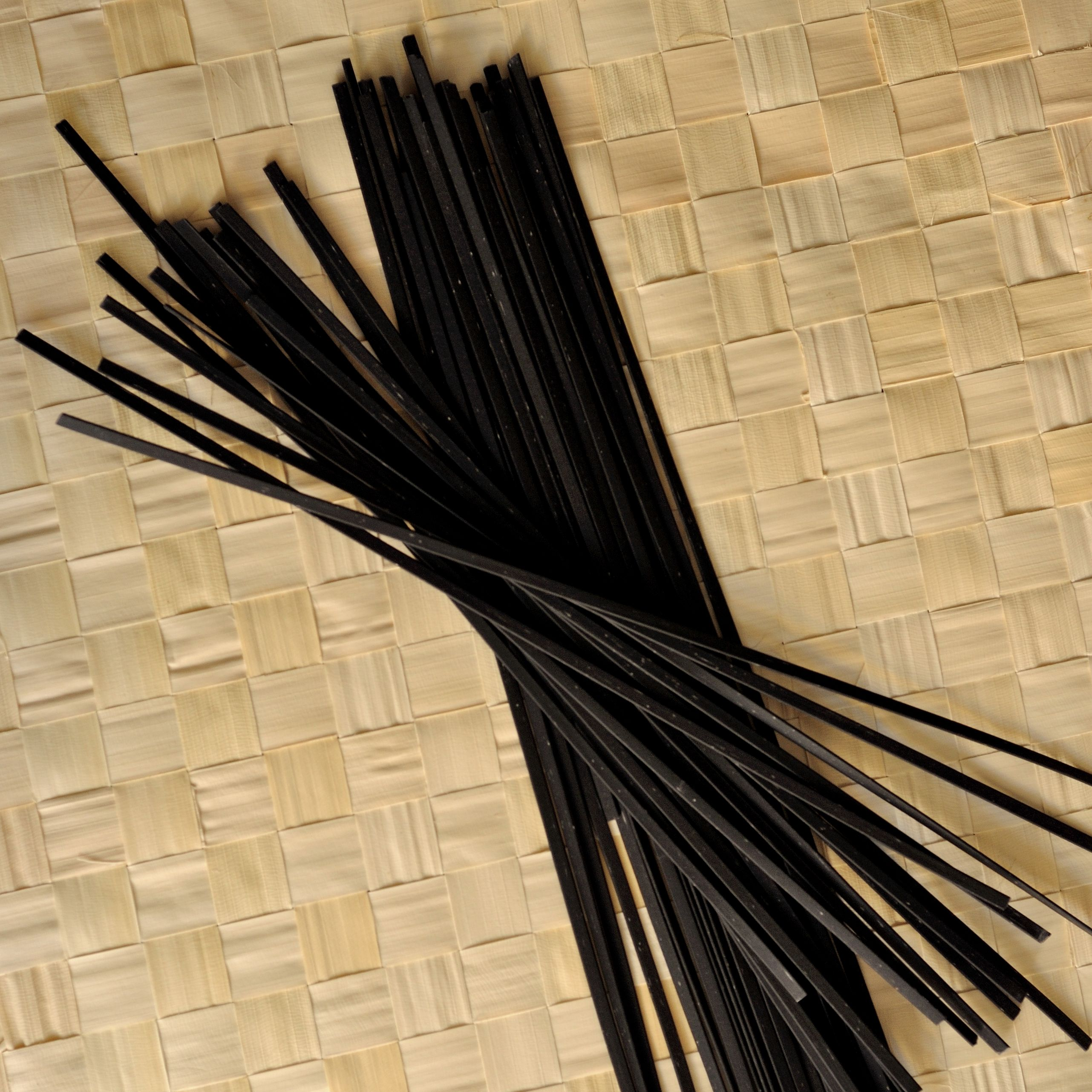 Linguine à l'encre de seiche.